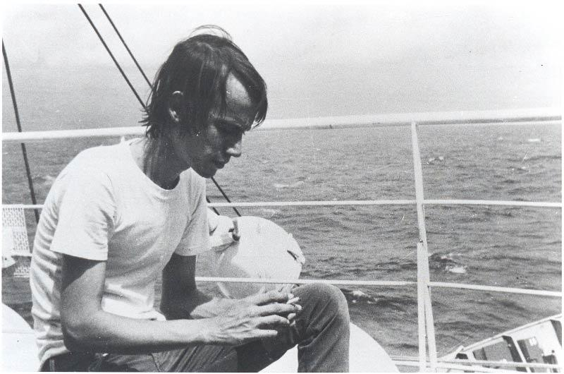 Silvio Rodríguez en 1969, a bordo del motopesquero Playa Girón. Fotografía compartida con el permiso de Silvio Rodríguez